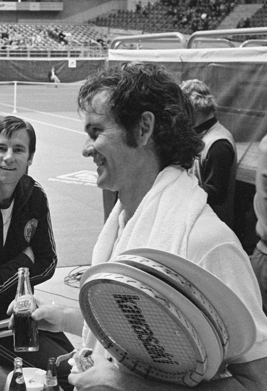 Proftennis in Ahoyhal, Rotterdam, Richey